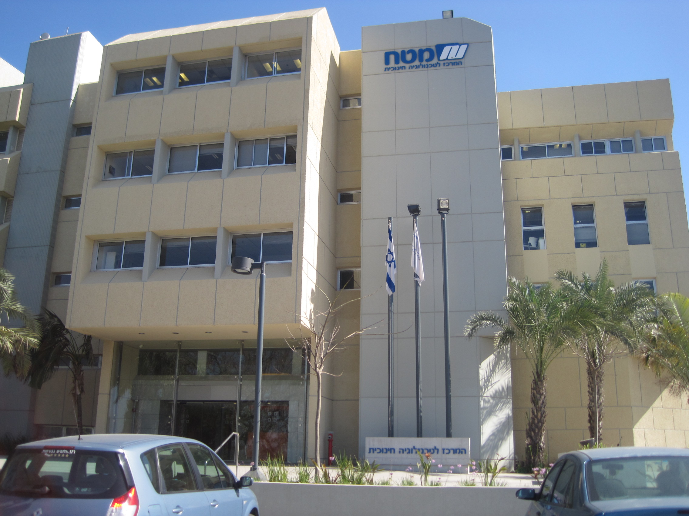 בניין המרכז לטכנולוגיה חינוכית